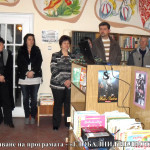 Библиотека при НЧ"Съединение 1875"